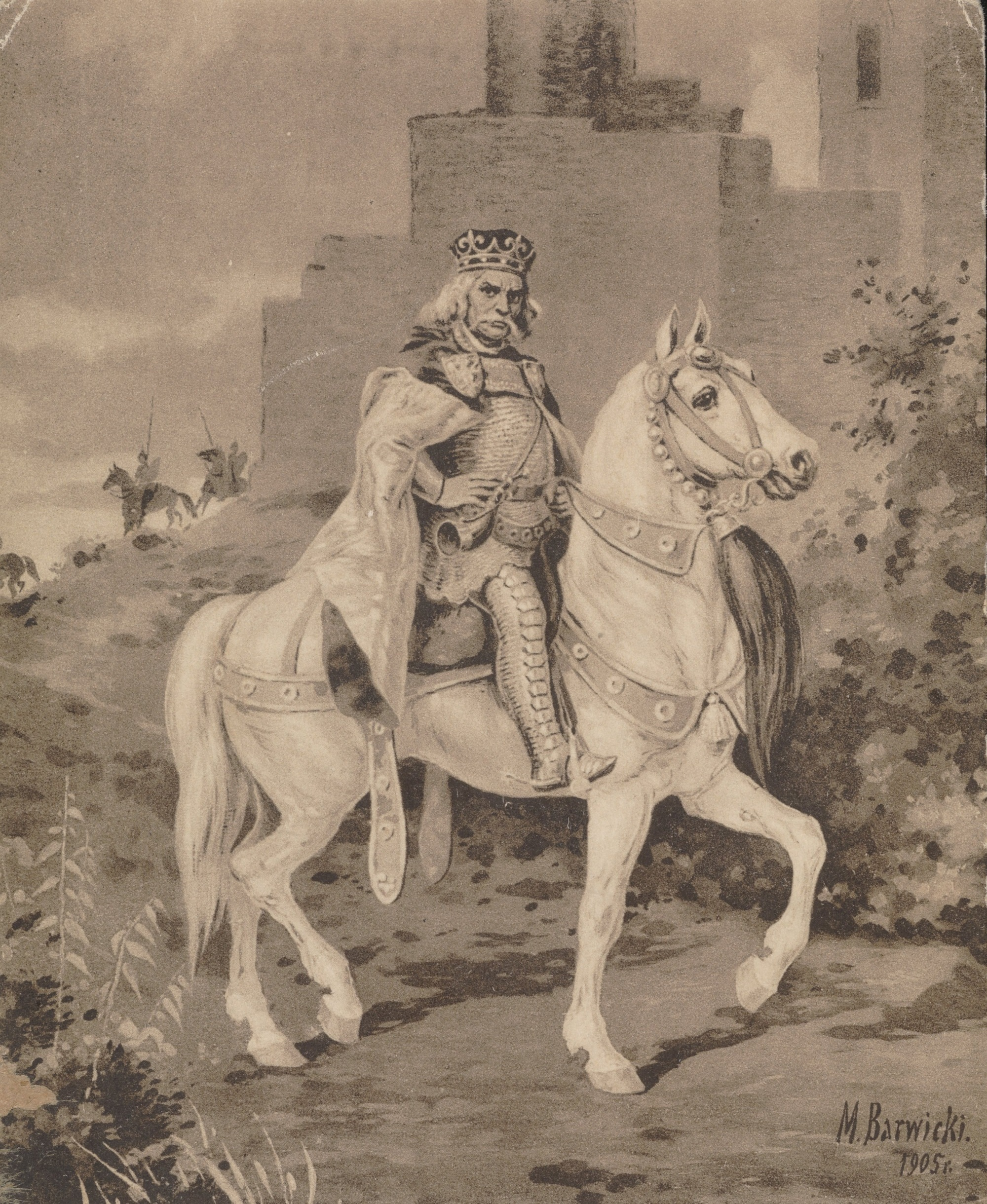 Portret Władysław Łokietek : 1305-1333. Mieczysław Barwicki, Warszawa, 1905 rok.